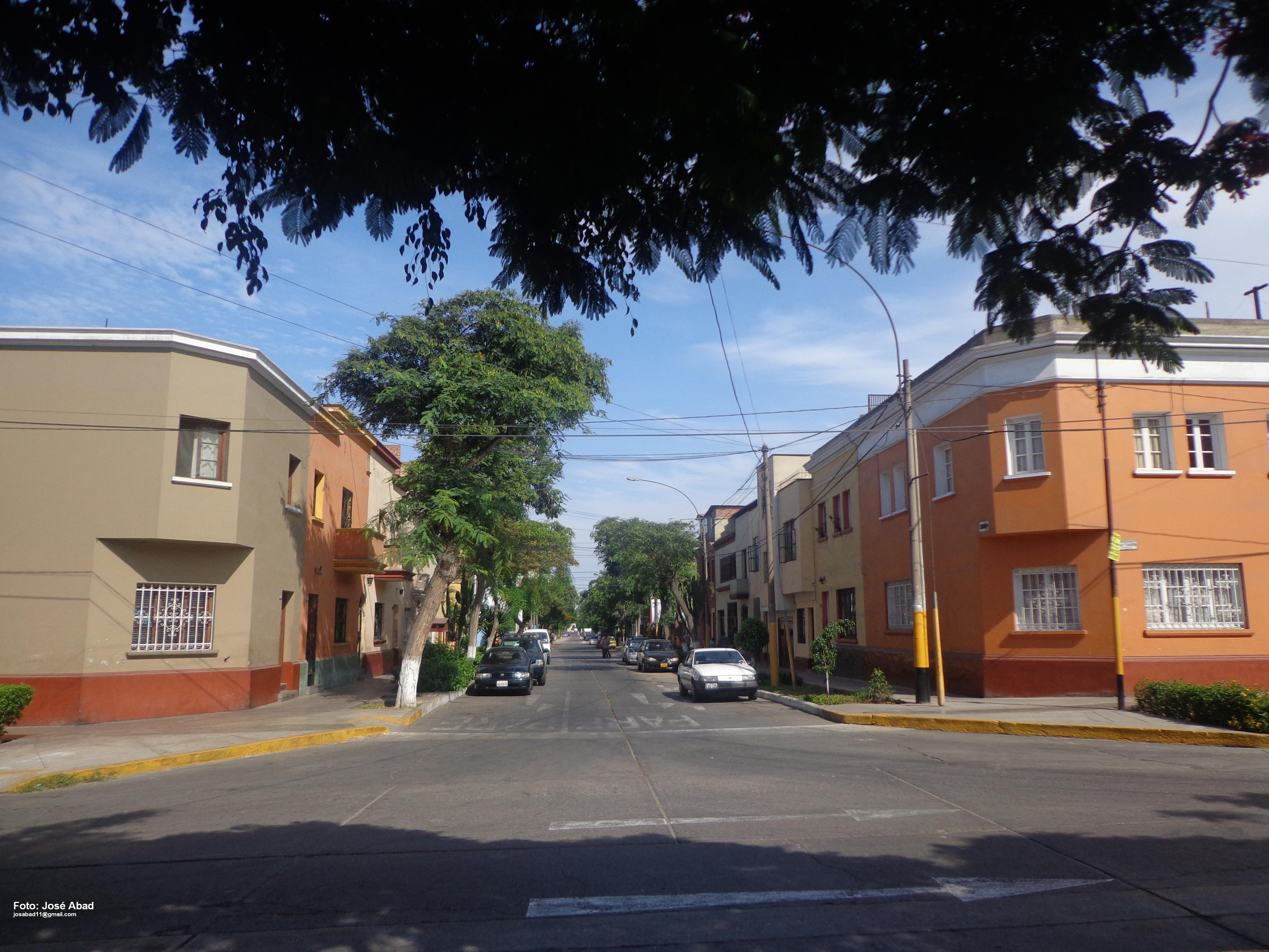 Vista del jirón General Vidal en el distrito de Breña.